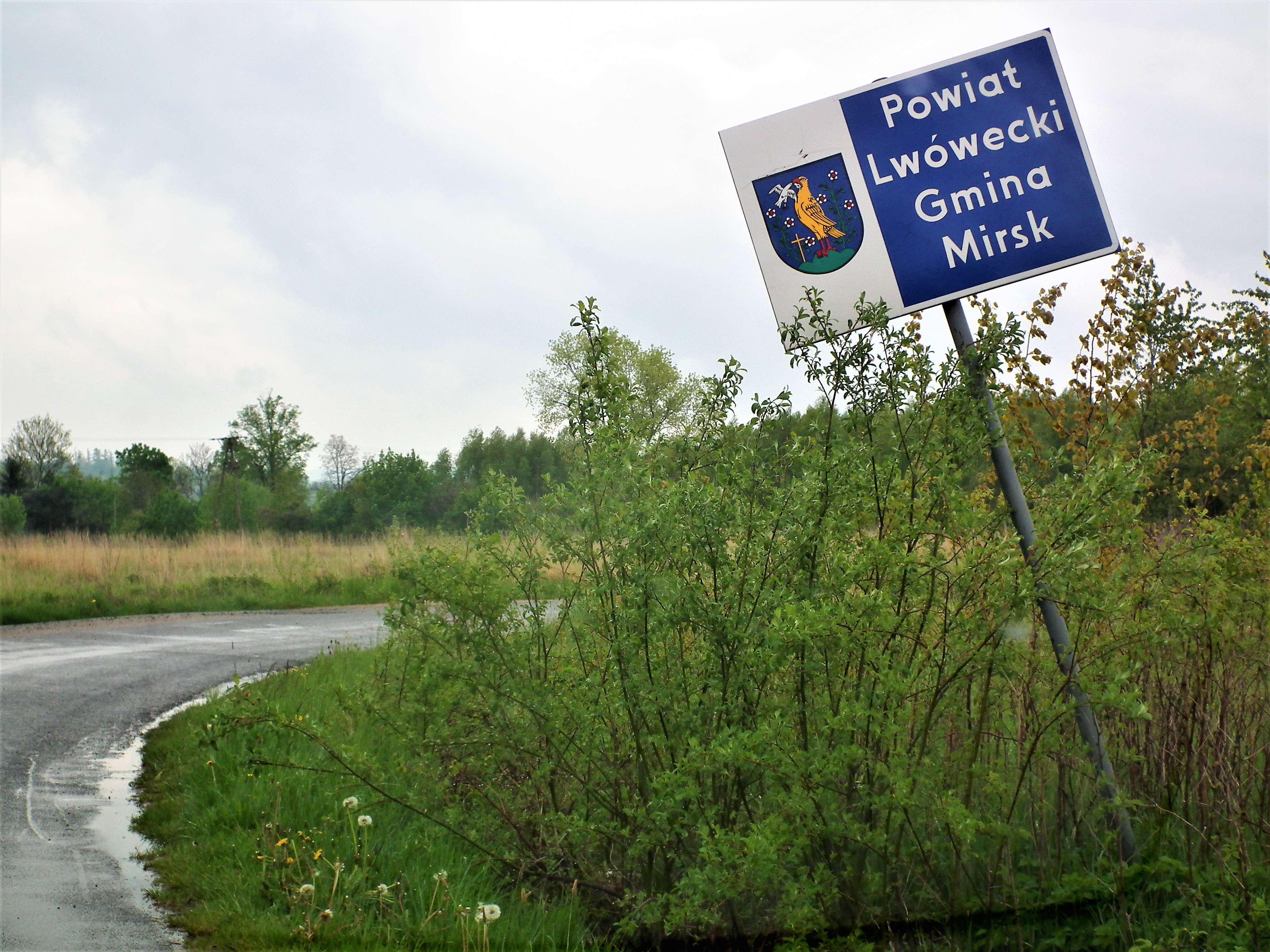 Wjazd do gminy Mirsk.